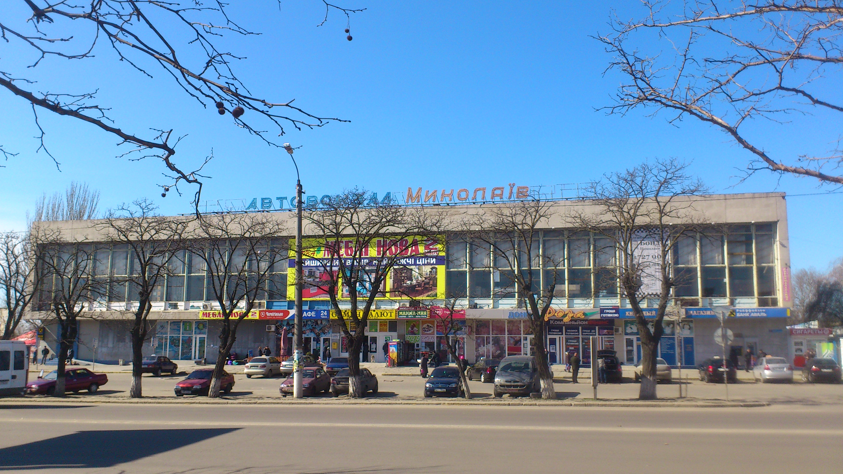 Миколаївський міжміський автовокзал